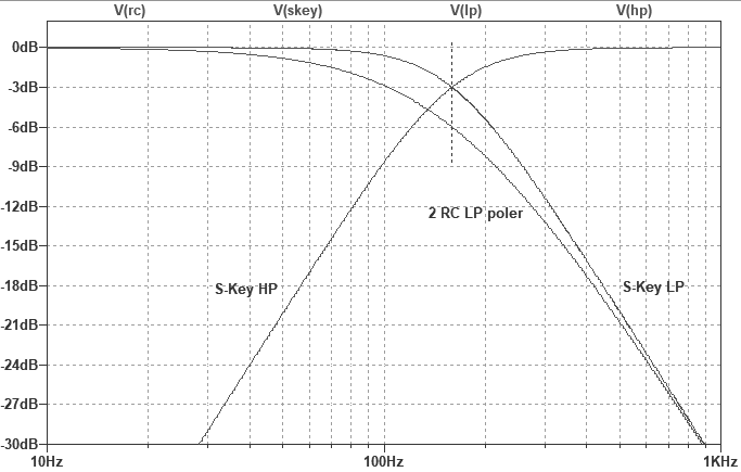 En graf som viser forskjellen mellom et Sallen-Key LP filter og to passive LP filtre i RC konfigurasjon